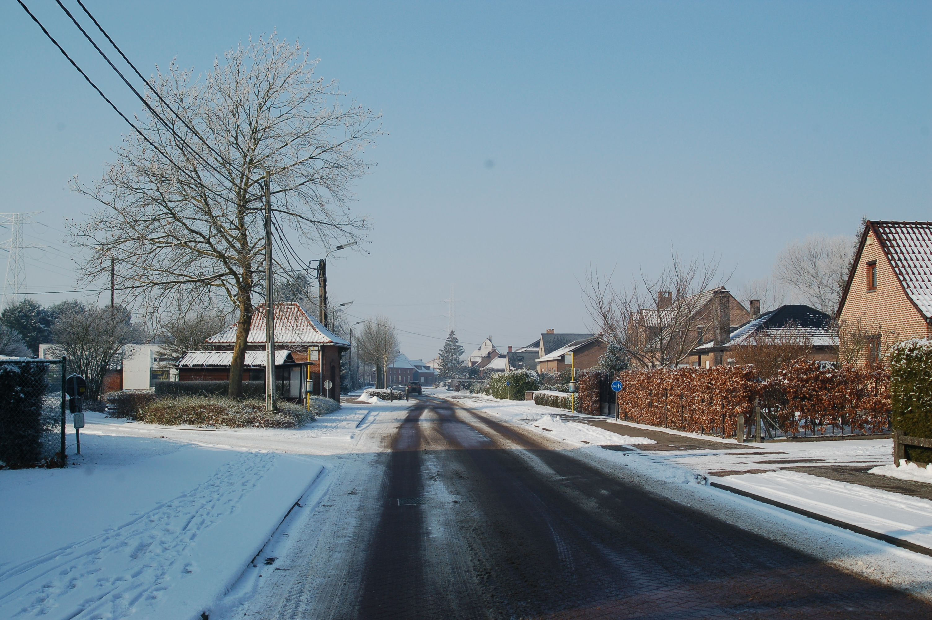 Het Spilt gezien vanop de Spiltstraat, februari 2012, Zemst-Bos